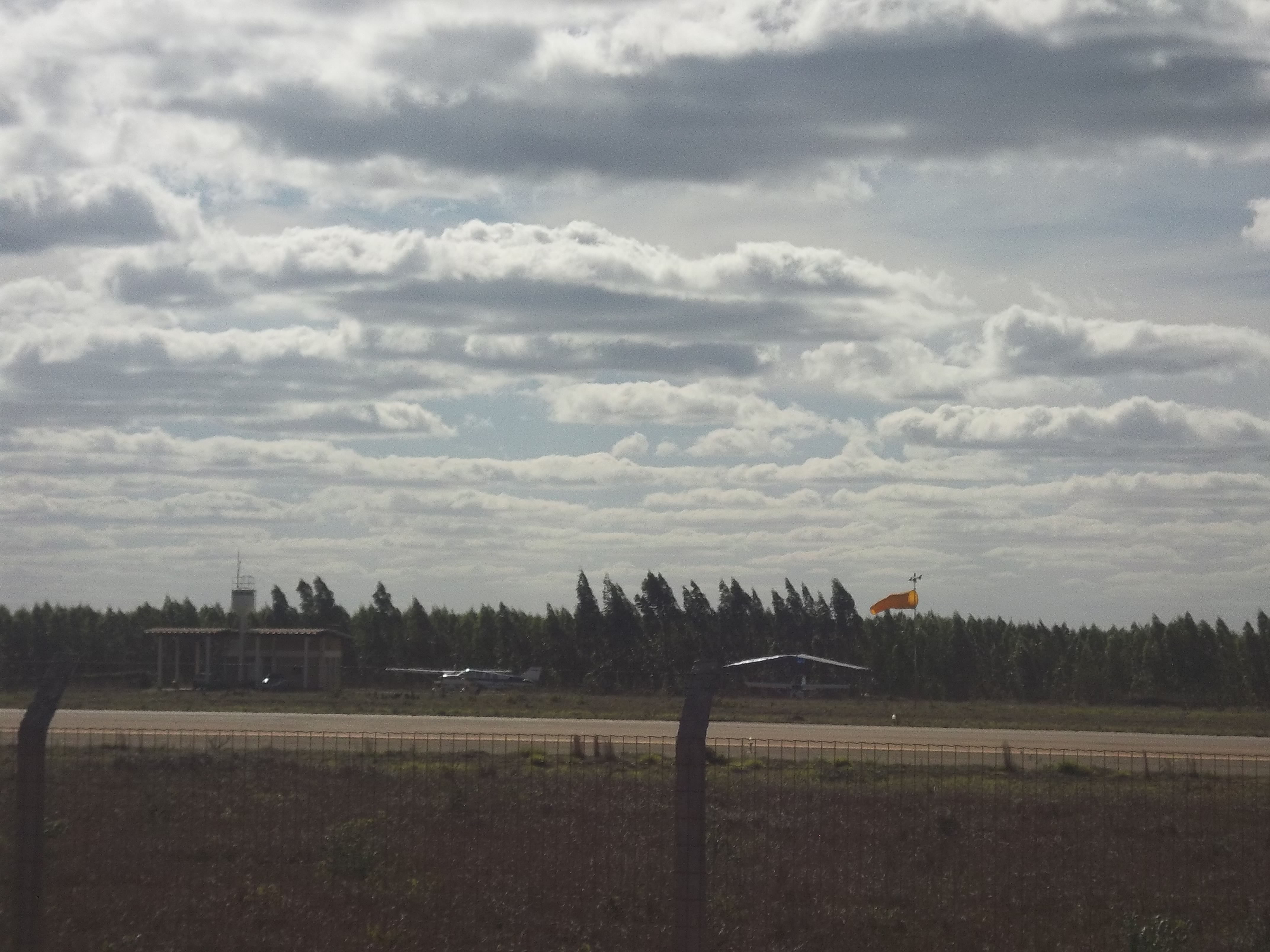 Aeroporto, visto por detrás das grades que o cercam.